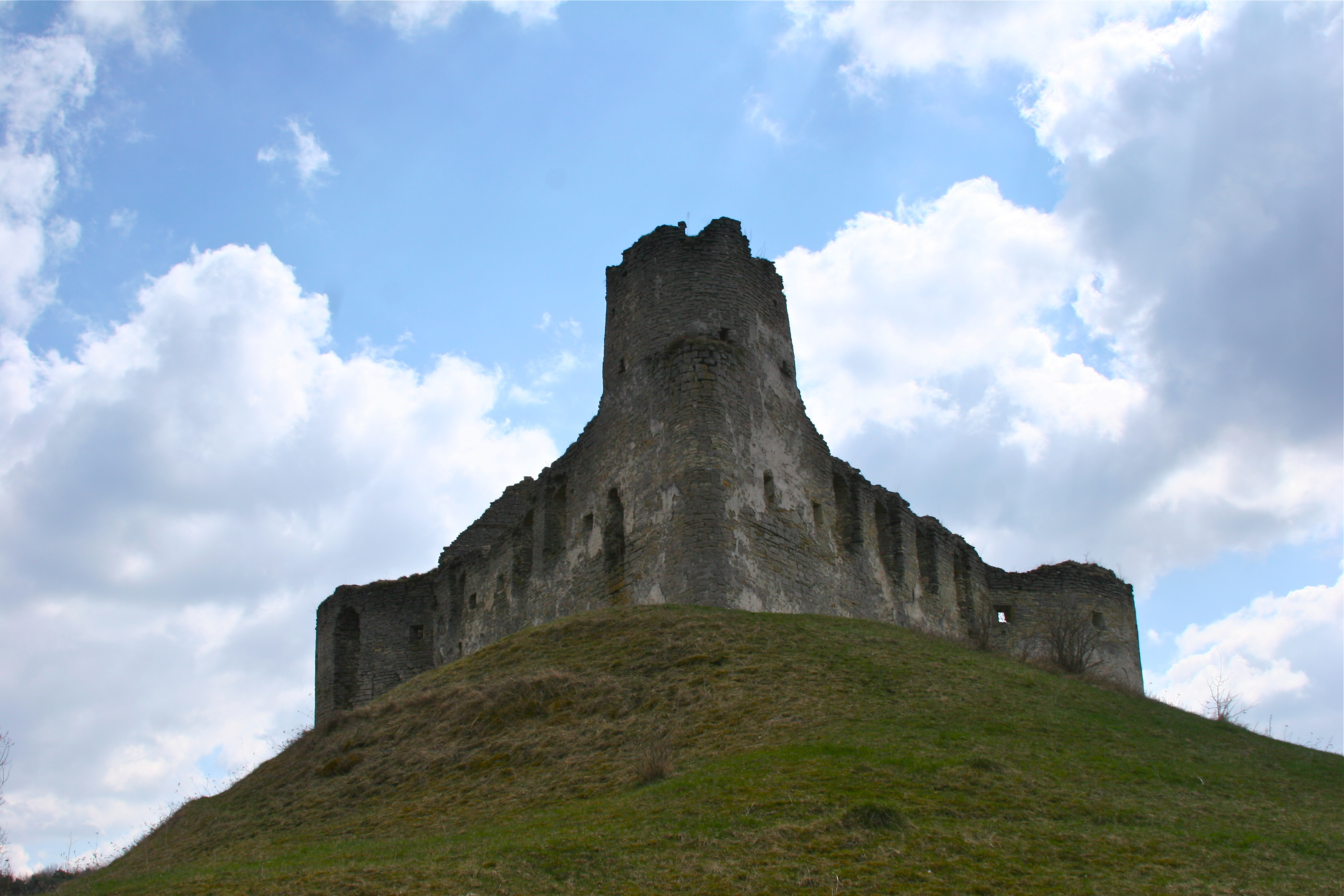 Замок у Сидорові, Тернопільської області